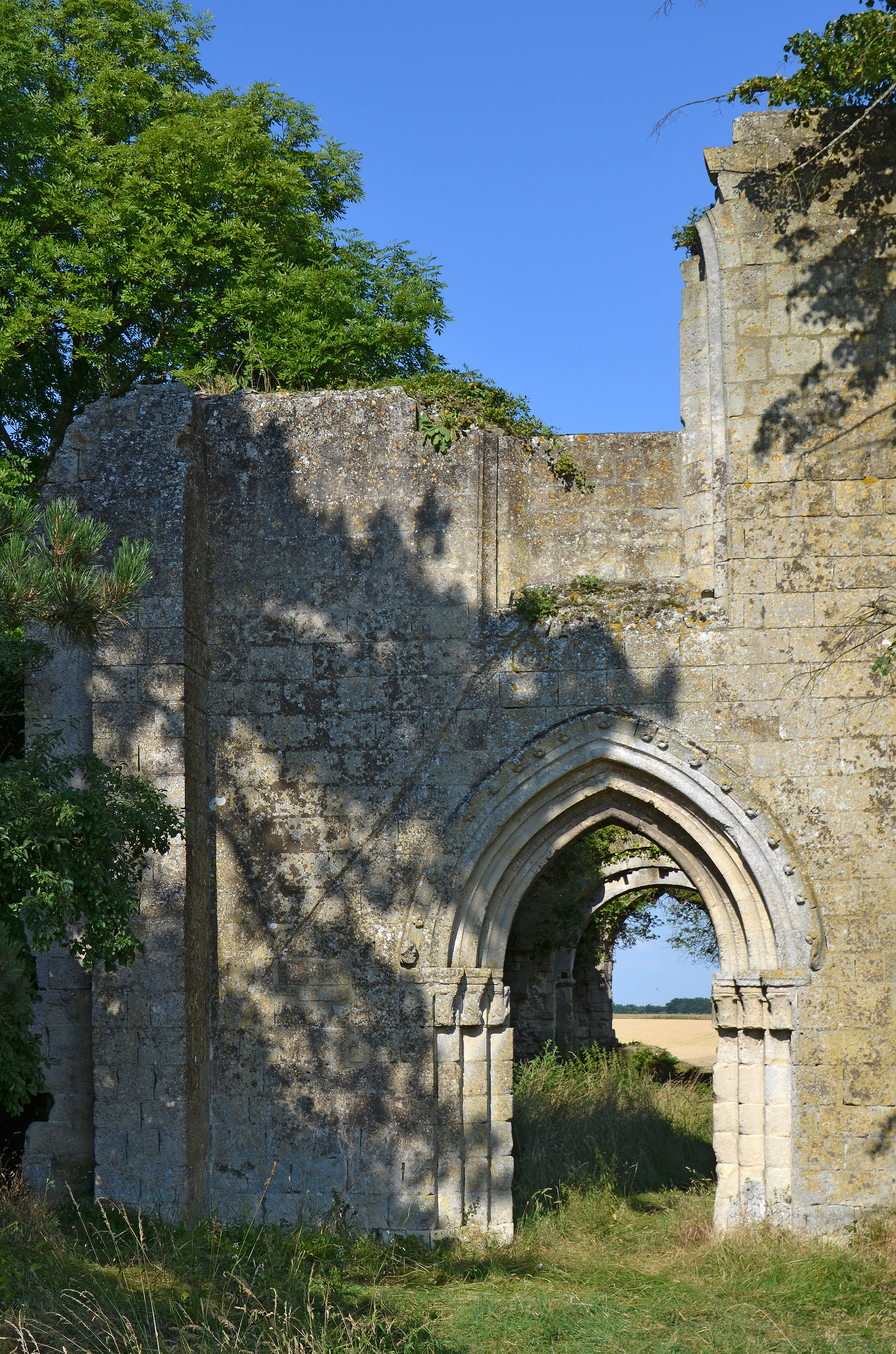 Ruines de la chapelle romane de Champlieu, Orrouy, Oise, France .